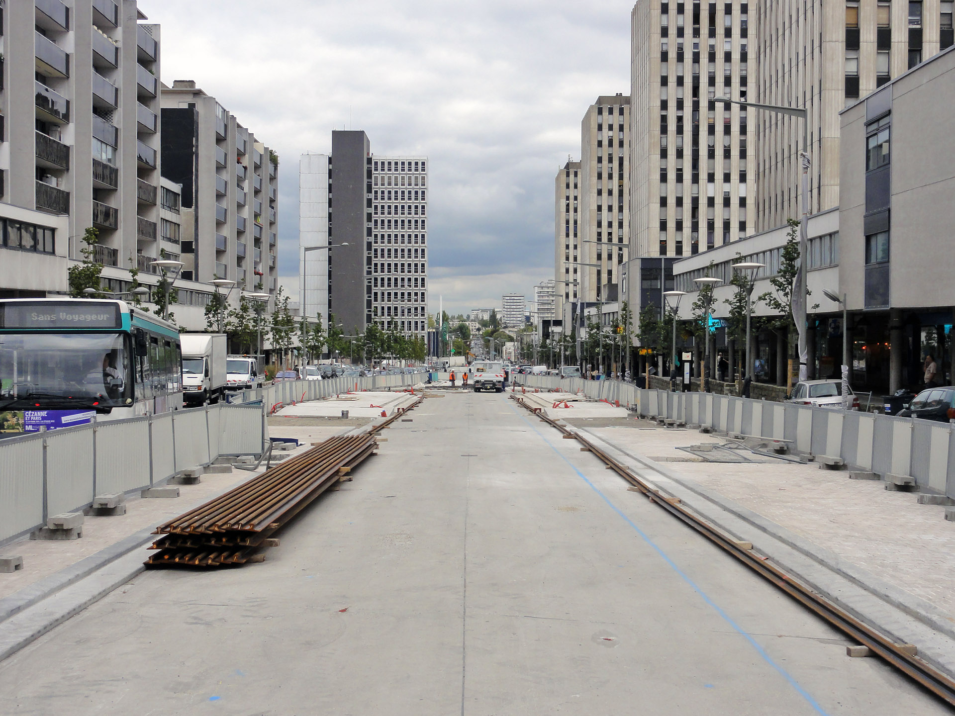 Travaux du T5, avenue du 8 mai 1945 à Sarcelles, France.